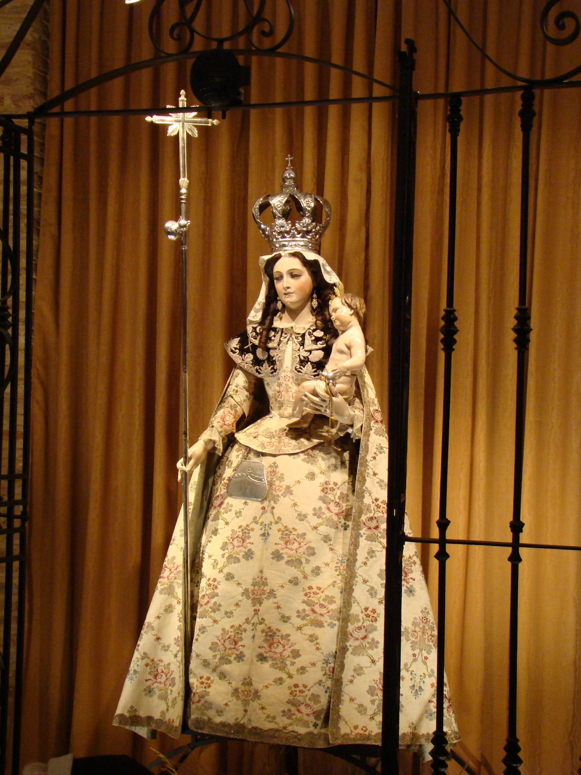 Imagen llamada "Virgen Peregrina" de la escultora Luisa Roldán. Perteneció al convento de franciscanos de Sahagún (León, España) y se conserva en el museo de las MM Benedictinas de Sahagún.